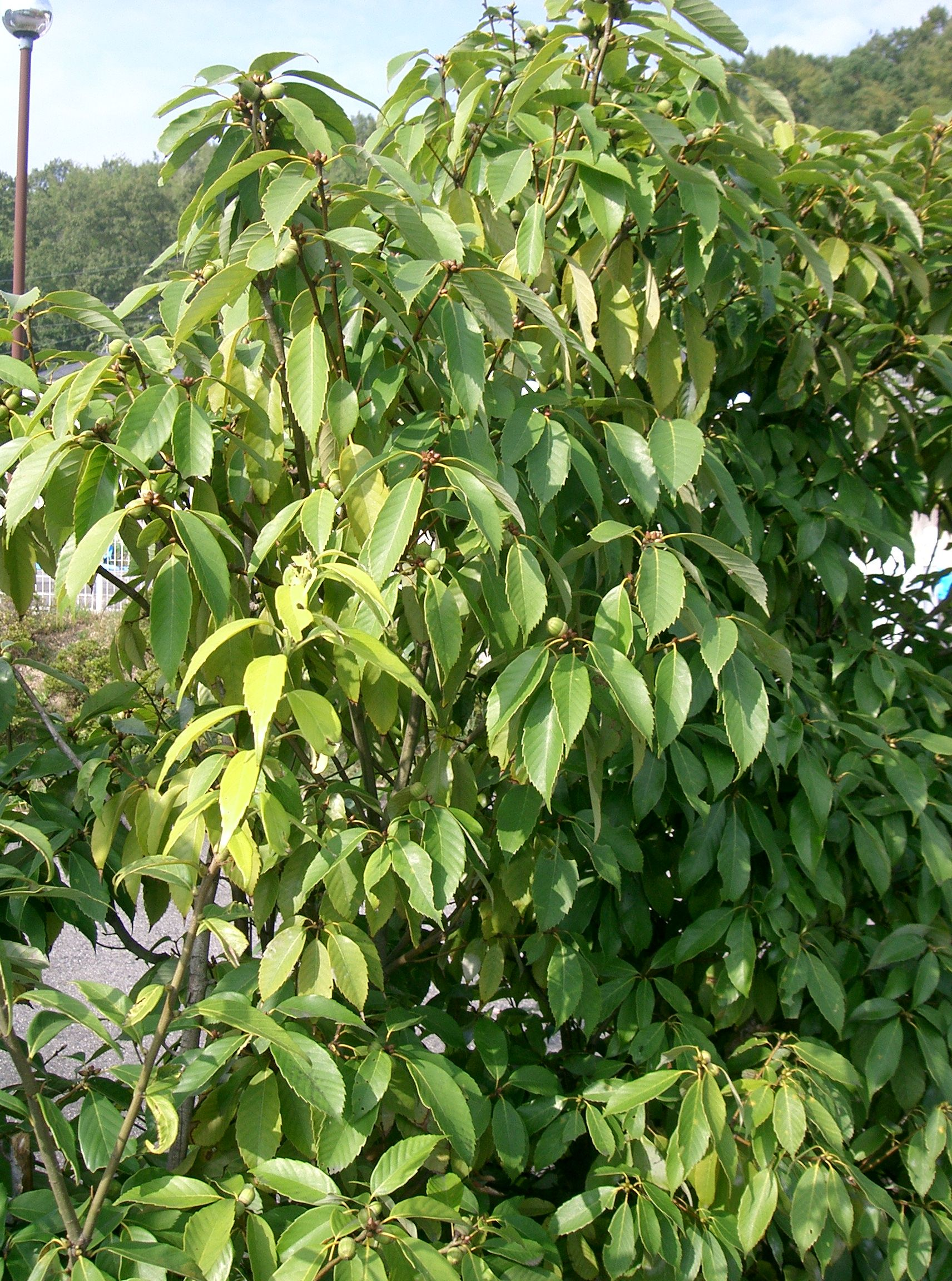 Scientific name Quercus glauca